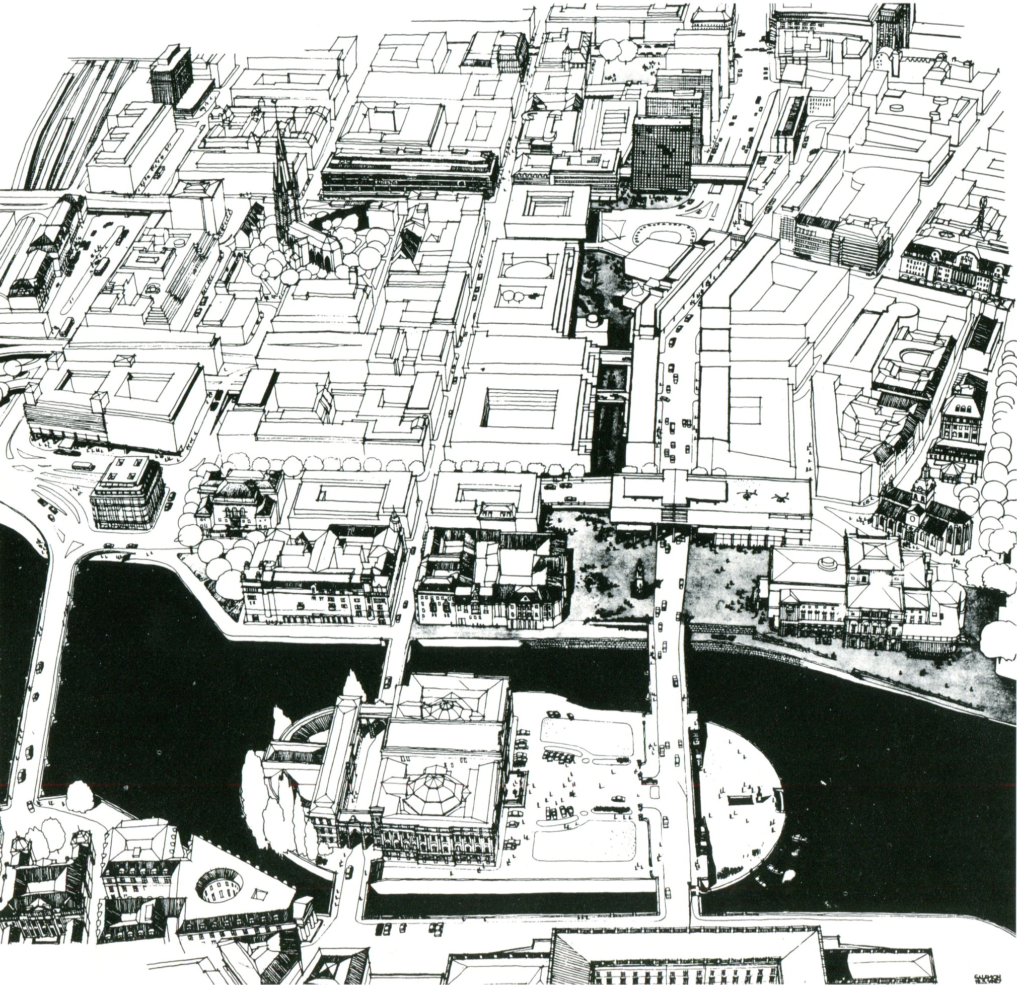 EGT-Gruppens förslag för omgestaltning av Nedre Norrmalm i Stockholm 1966